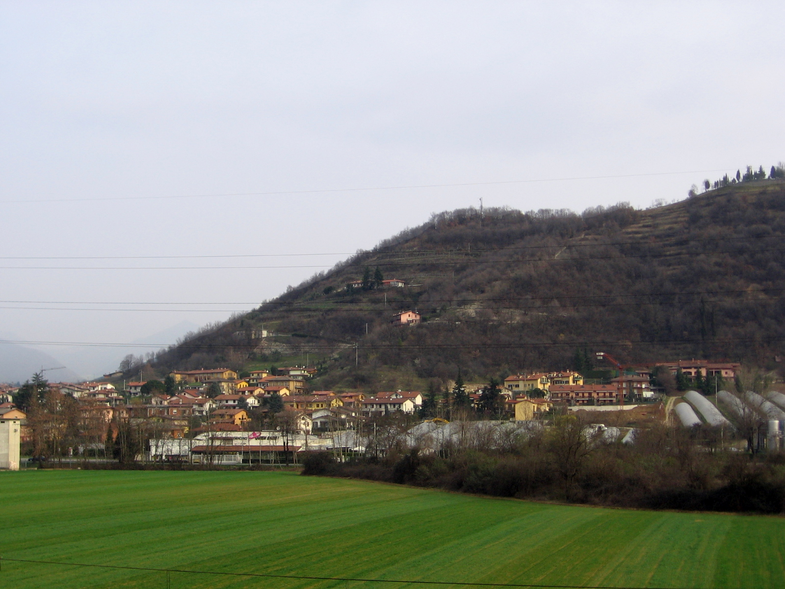 Albano S.Alessandro, Bergamo, Italy